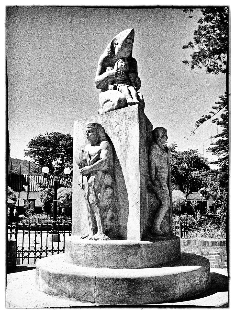 Canon A470 + ufraw + SFX